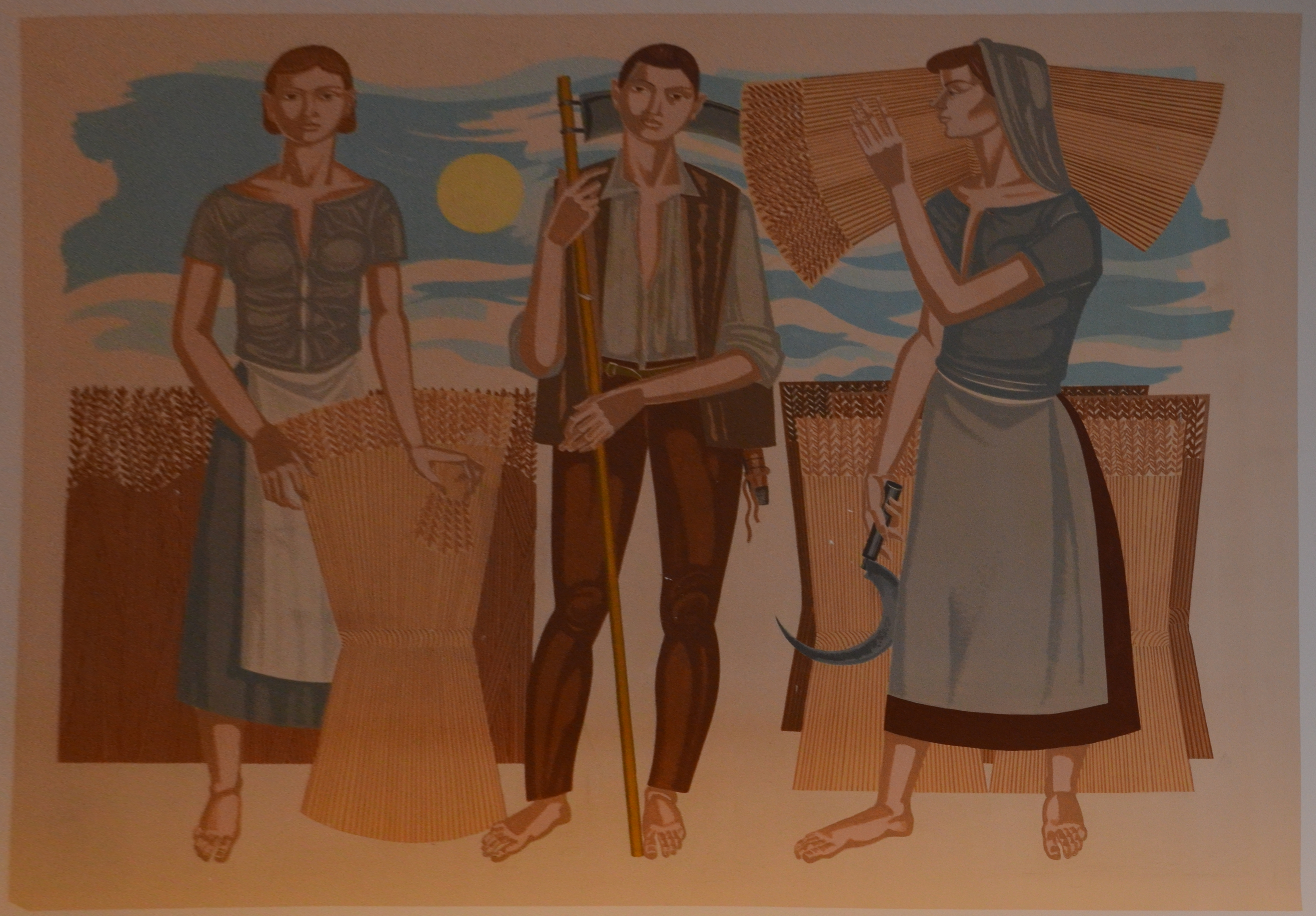 Charleroi - Palais des beaux-arts - peinture murale de Gustave Camus dans l'ancienne brasserie, espace actuellement occupé par la médiathèque.